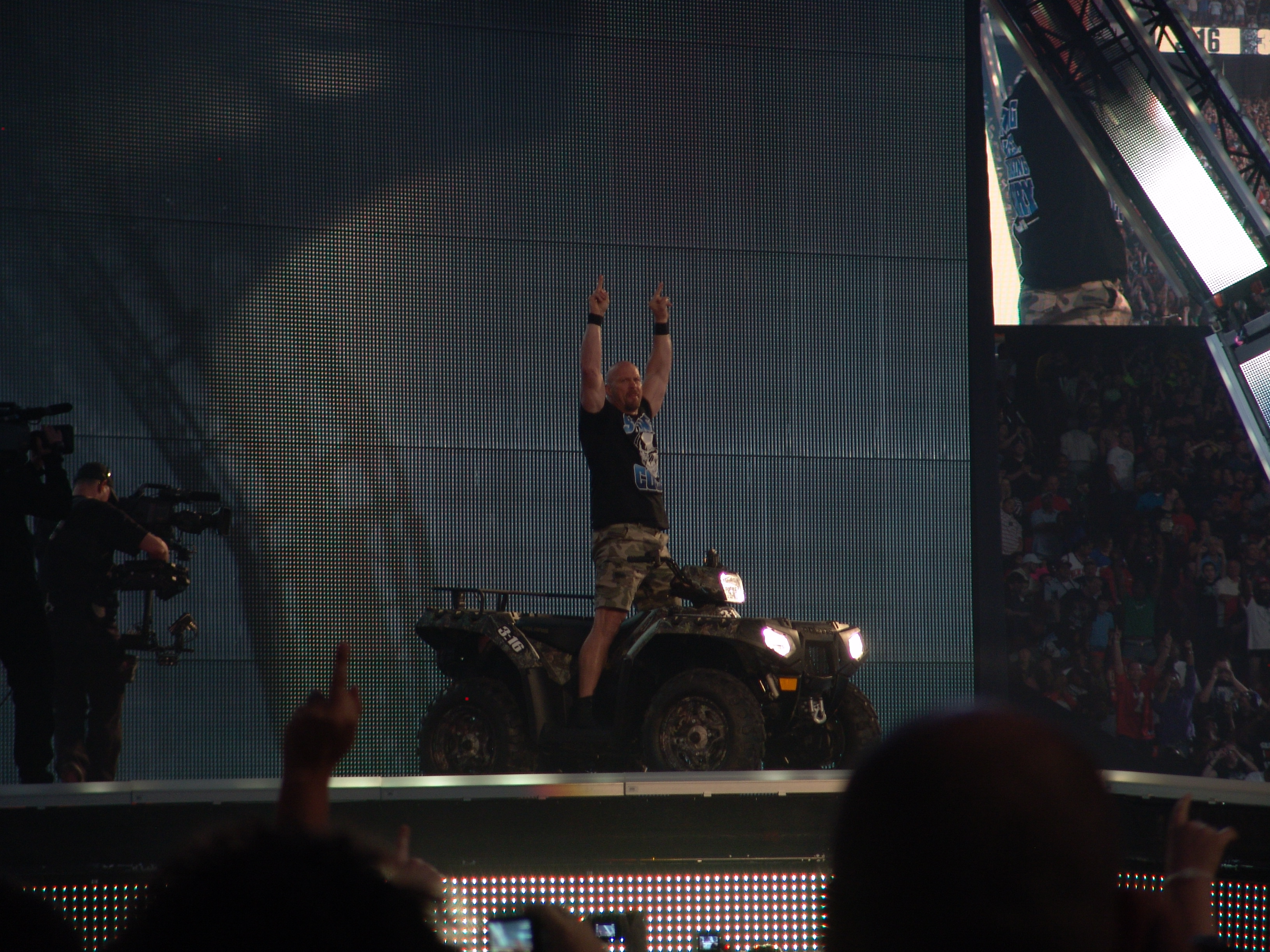 Austin en WM 27